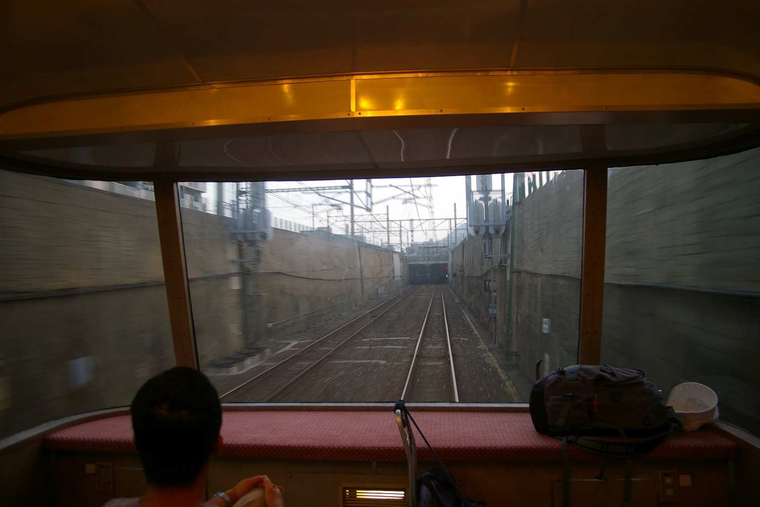 Kanmon-tunnel_railway (Moji side)